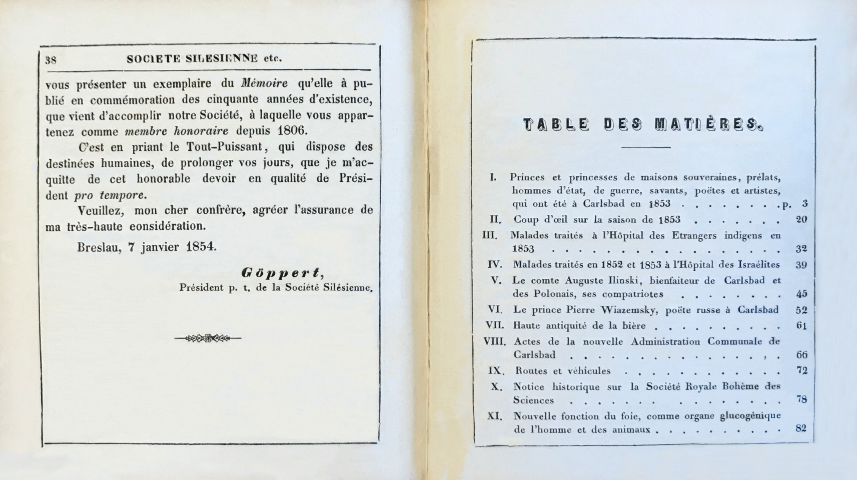 Almanach de Carlsbad 1854 obsah